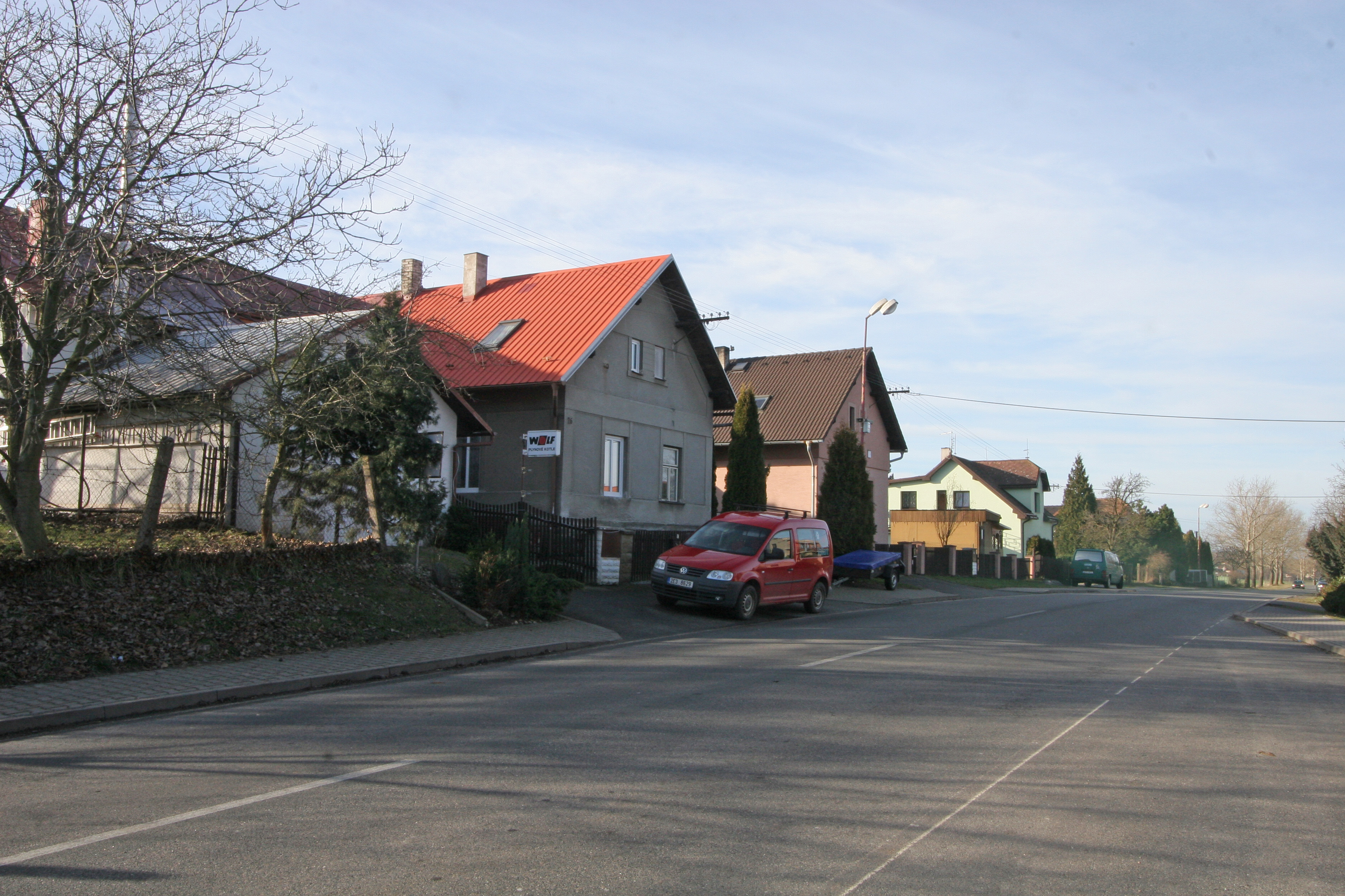 Lažany čp. 26